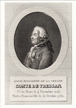 Louis Elisabeth de la Vergne, Comte de Tressan